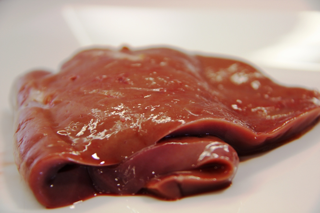 Rohe Kalbsleber.